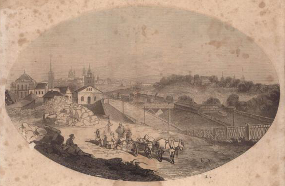 Беларуская (тарашкевіца): Рослаў (Rosłaŭ). Агульны выгляд места